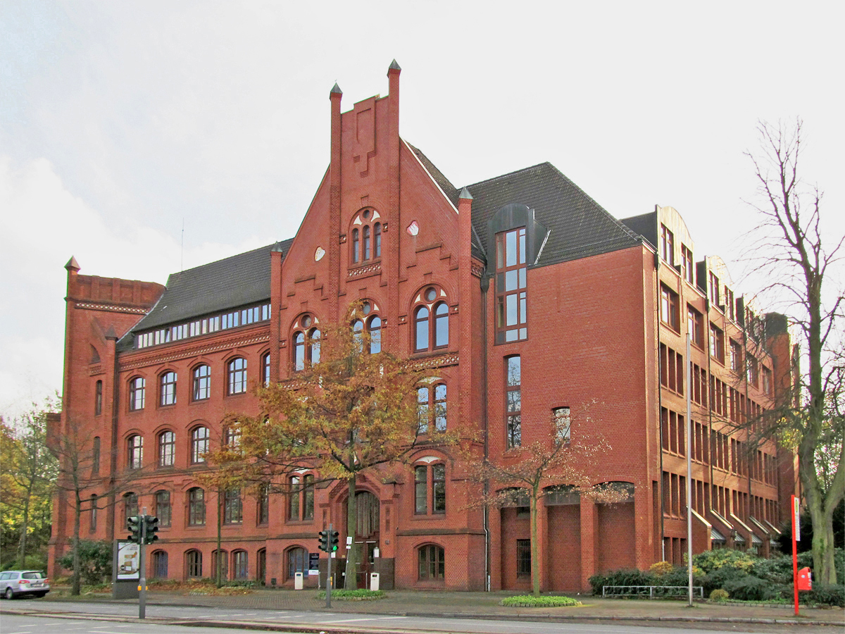 Rathaus, Hamburg-Wilhelmsburg, Mengestr. 19